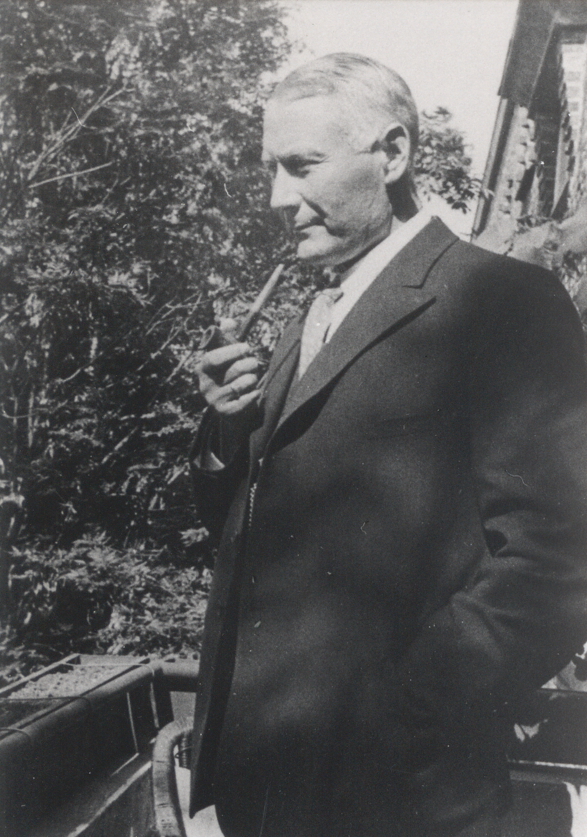 Den danske matematiker Jakob Nielsen